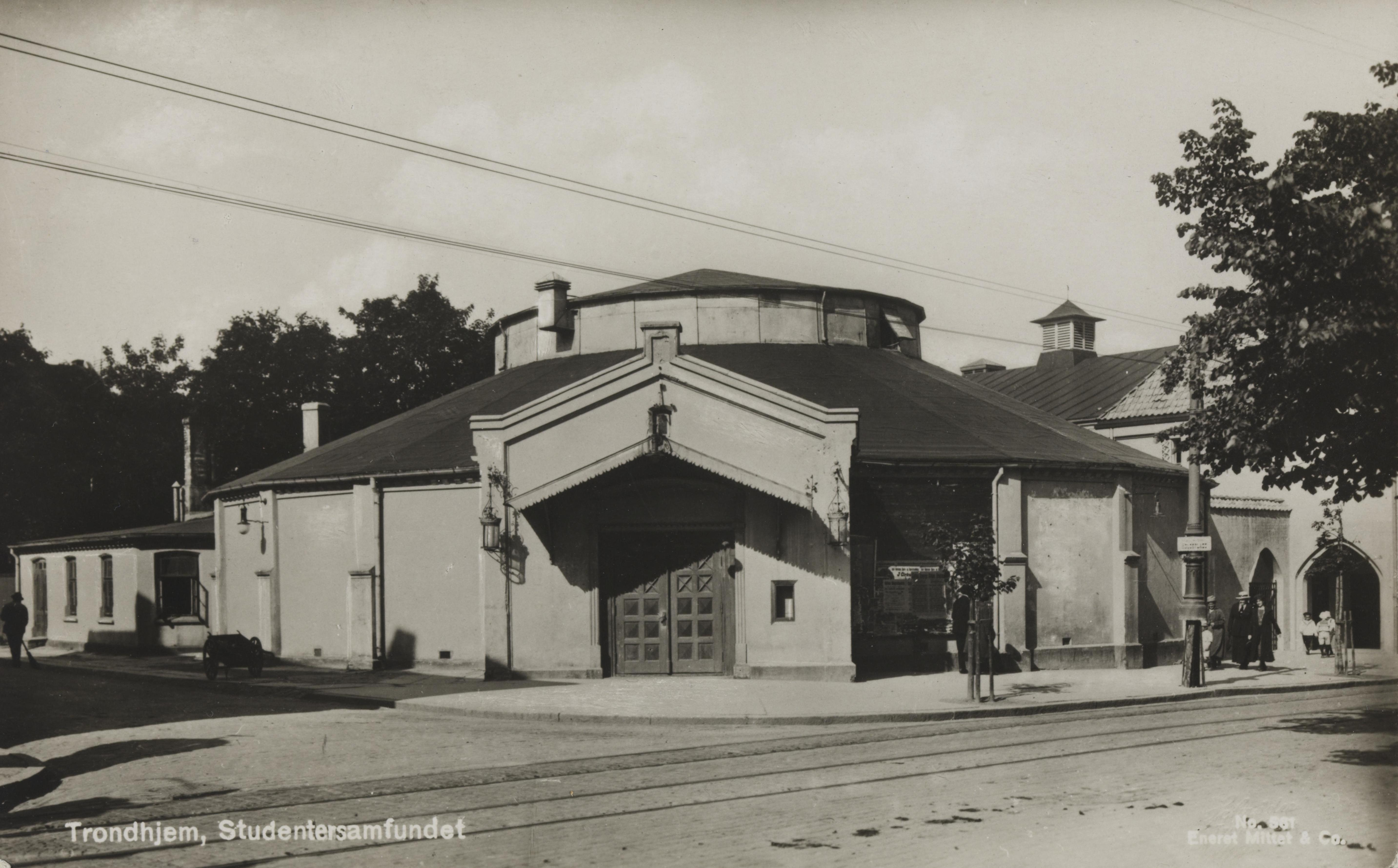 Bildet er hentet fra Nasjonalbibliotekets bildesamling Midtbyen,Prinsens gate, Trondheim, Sør Trøndelag